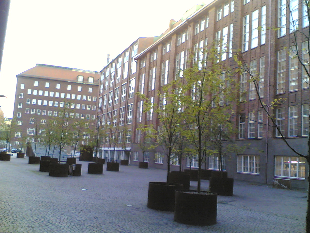 Kaikukatu